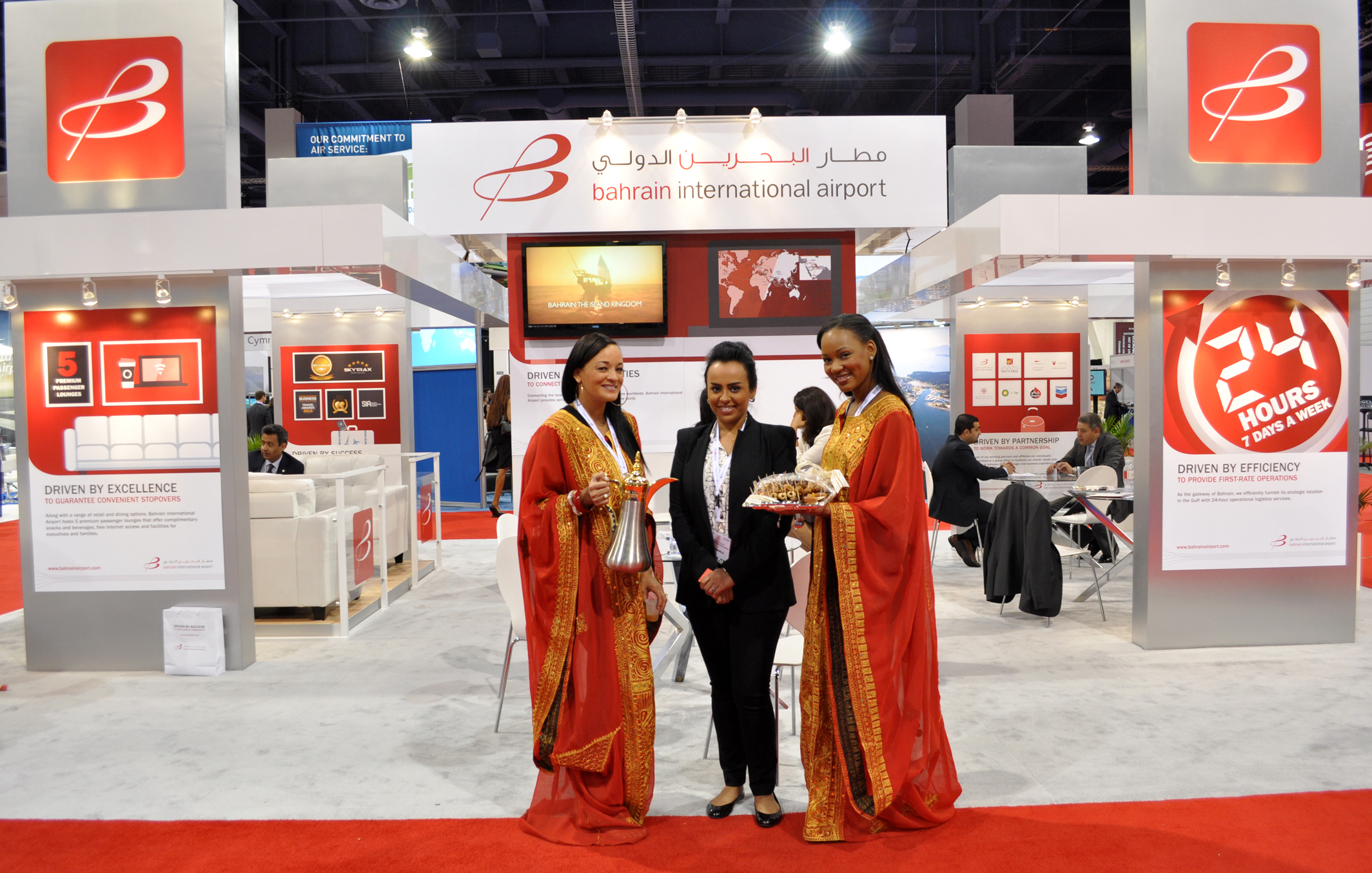 BIA stand